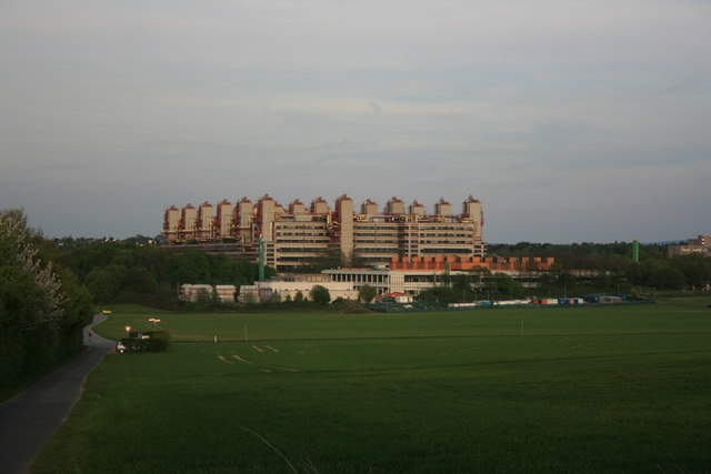 Aachener Klinikum, 5 km from Aachen, Deutschland (Zone 32).